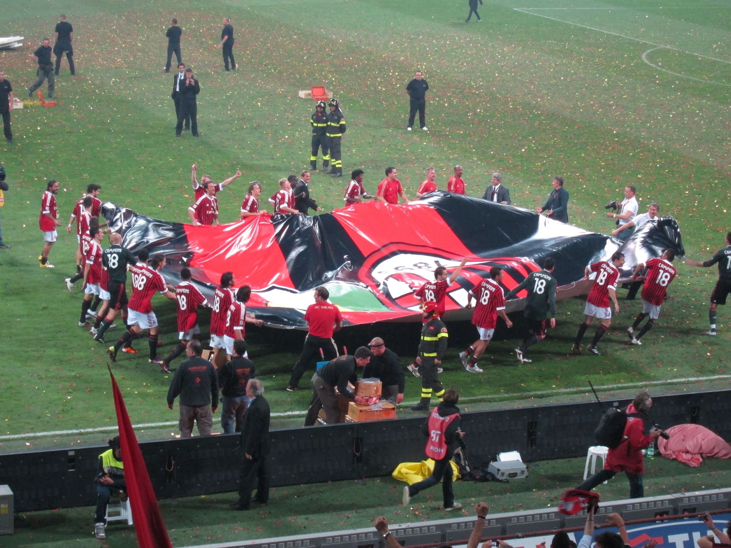 AC Milan